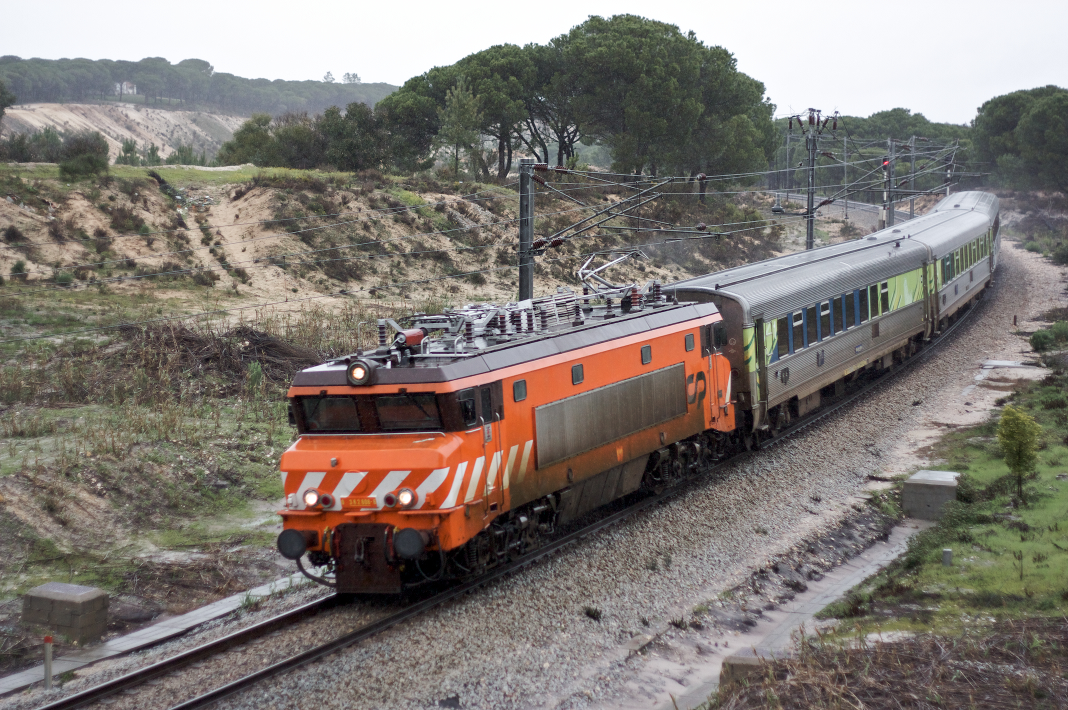 Tipo: Comboio Intercidades 572 [Lisboa • Oriente - Faro] Local: Alcácer do Sal [Linha do Sul, PK 87] Data e hora: 28 de Fevereiro de 2010 [14h55] Material: Locomotiva 2608 + 3 carruagens Sorefame Renovadas